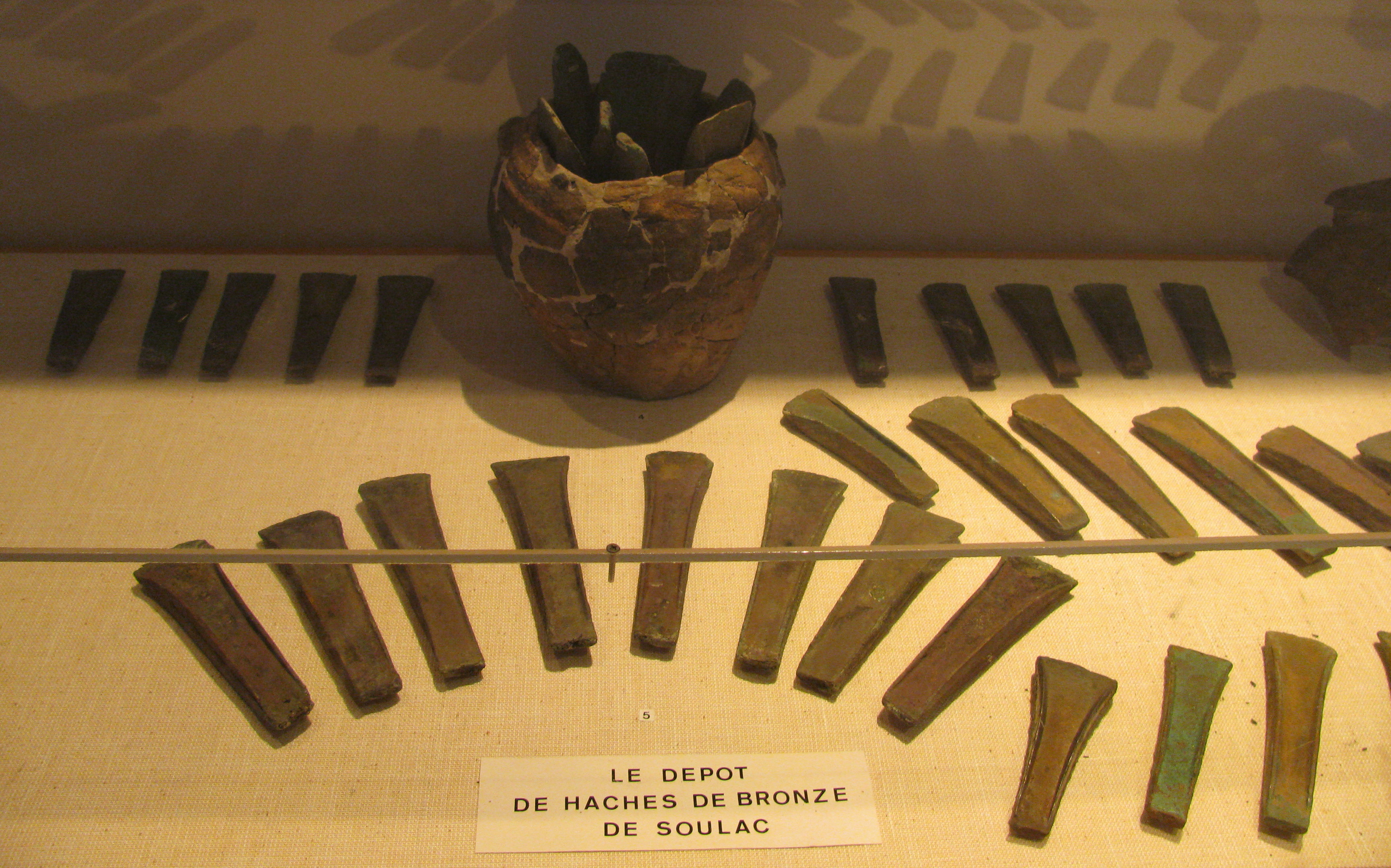 Dépot de haches de bronze de type médocaines (lames à bord large) - Musée de Soulac-sur-Mer - Gironde - France